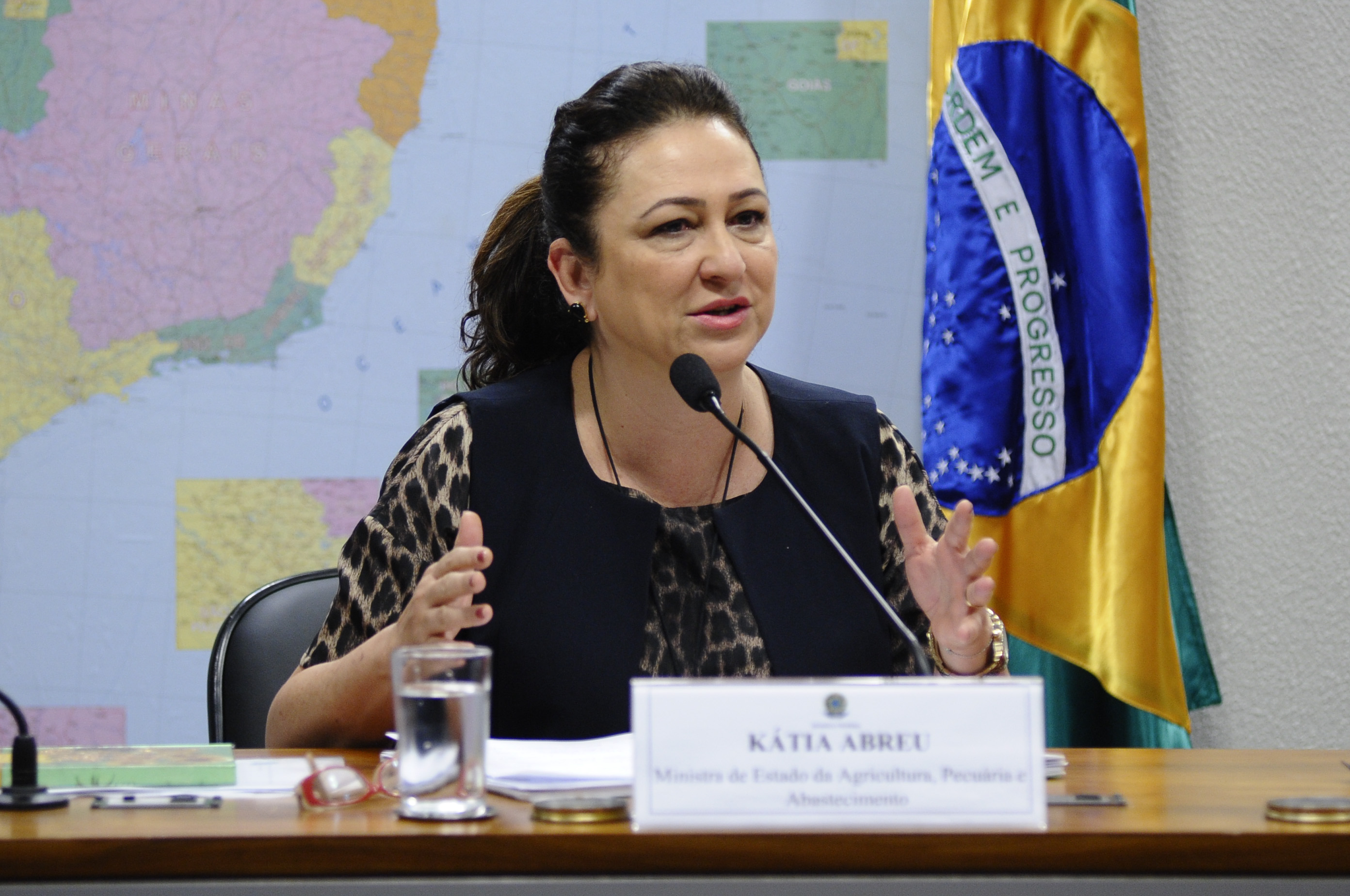 Sala de comissões do Senado durante audiência pública na Comissão de Agricultura e Reforma Agrária (CRA) para conhecer as diretrizes e os programas prioritários do Ministério da Agricultura, Pecuária e Abastecimento, a serem apresentados pela ministra Kátia Abreu. Em pronunciamento, ministra da Agricultura, Pecuária e Abastecimento (Mapa), Kátia Abreu. Foto: Pedro França/Agência Senado